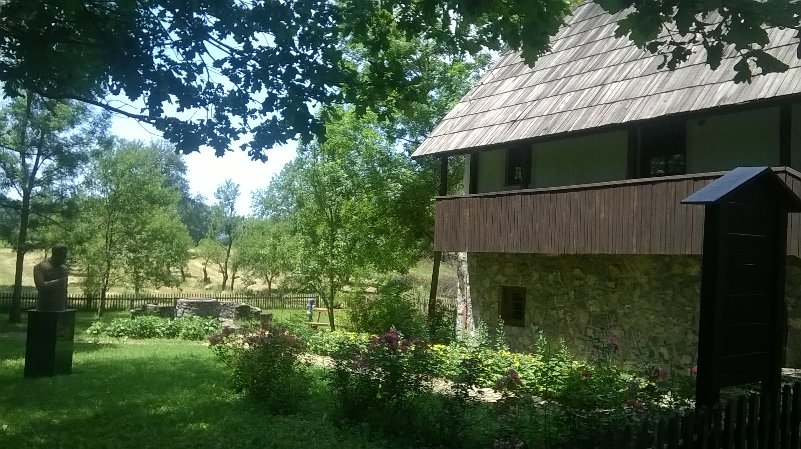 Rodna kuća Ante Starčevića